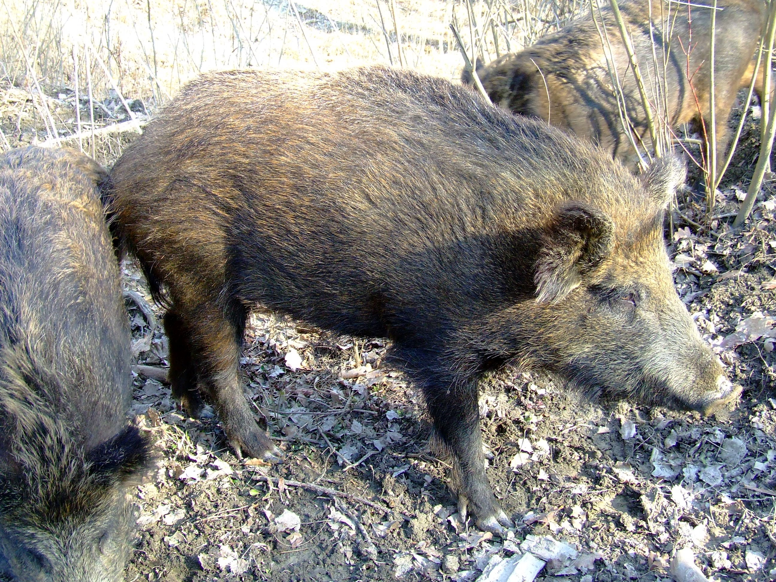 Duna-Dráva Nemzeti Park, Gemenci erdő